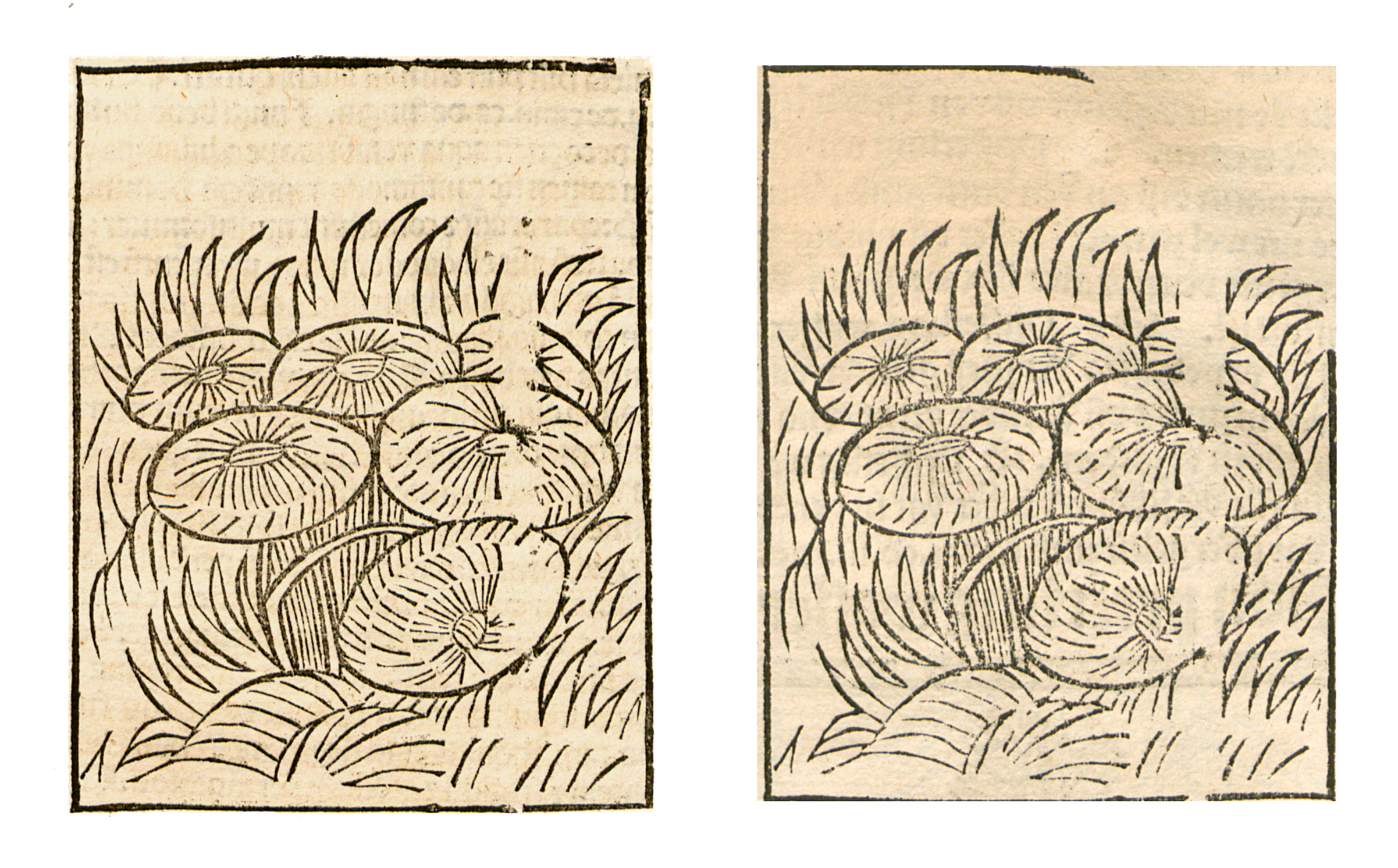 Abbildung von: Pfifferling (Lactarius piperatus)